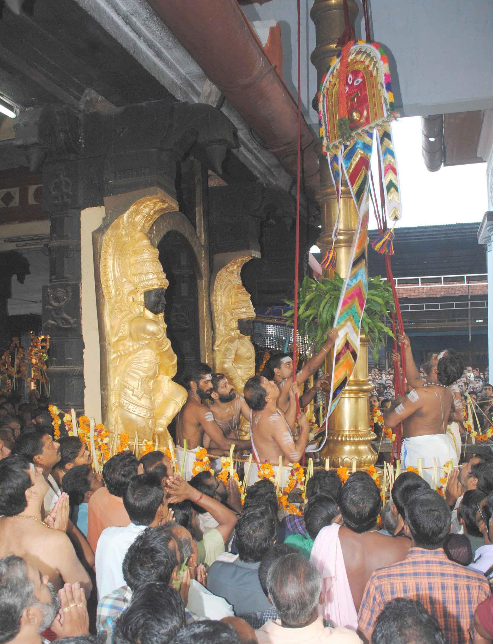 വൈക്കത്തഷ്ടമി കൊടിയേറ്റ്